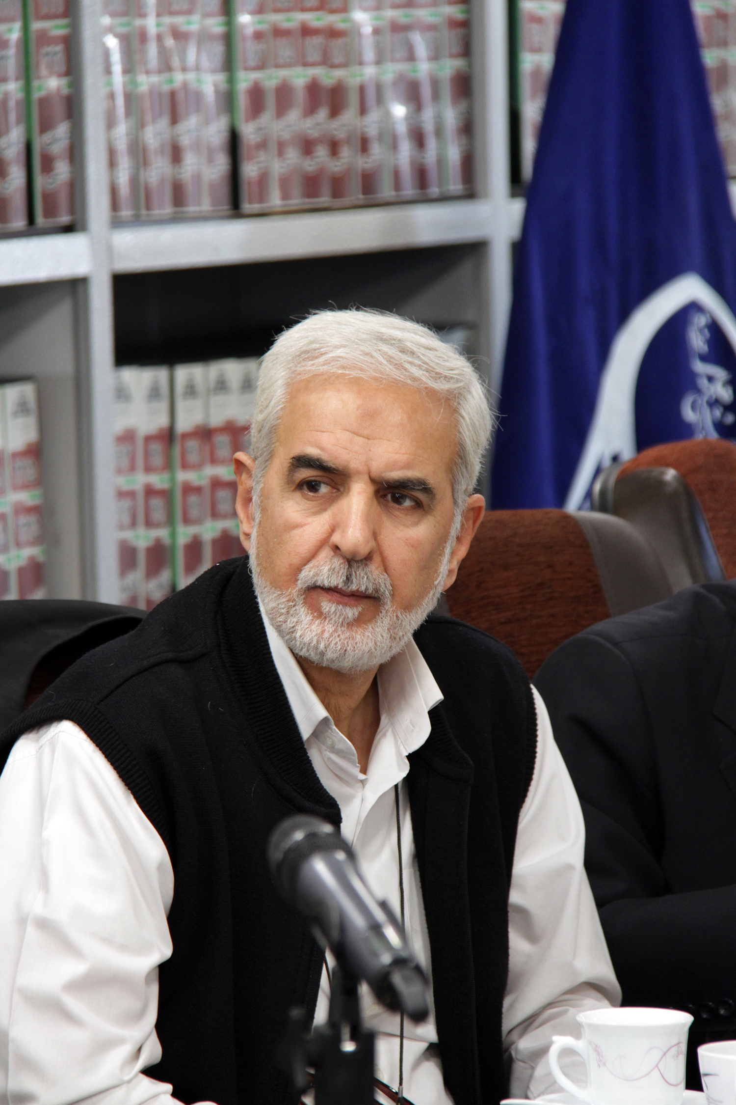 دکتر جواد کاشانی در مرکز پژوهشی دانشنامه های حقوقی علامه